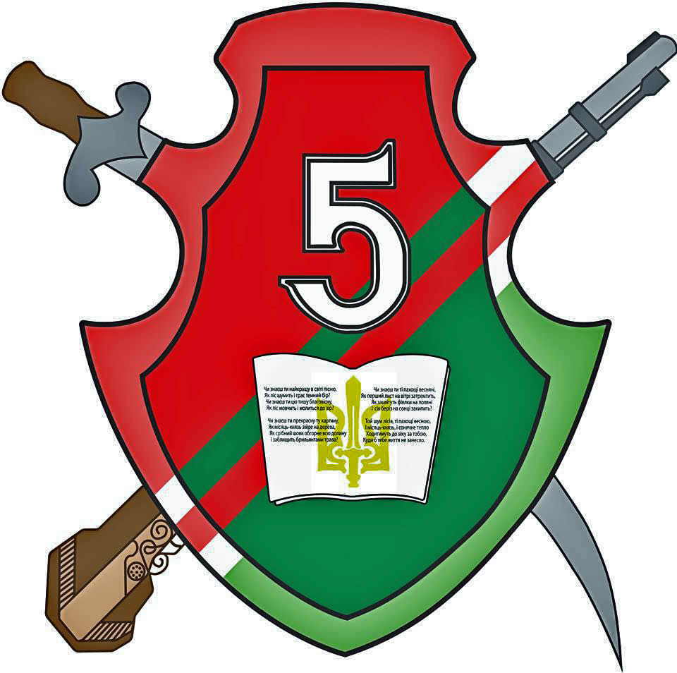 наш герб